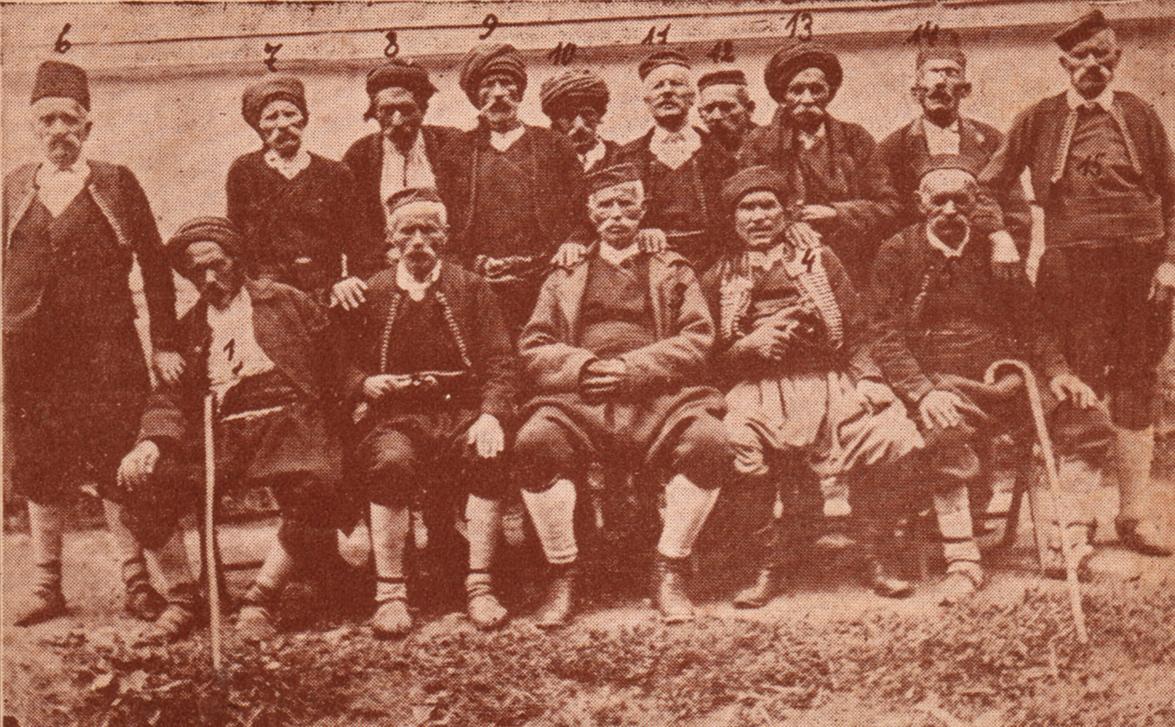 Српски (ћирилица): Старешине херцеговачког устанка 1875. године